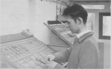 Oud beroep: letterzetter of typograaf. Drukkerij te Gent. Foto gemaakt met de draadontspanner.